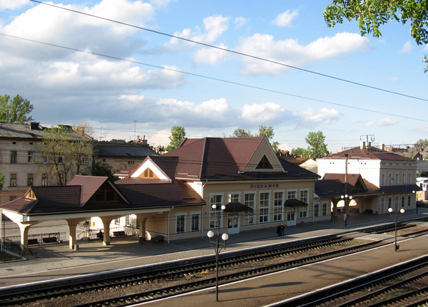 Станція «Підзамче» у Львові